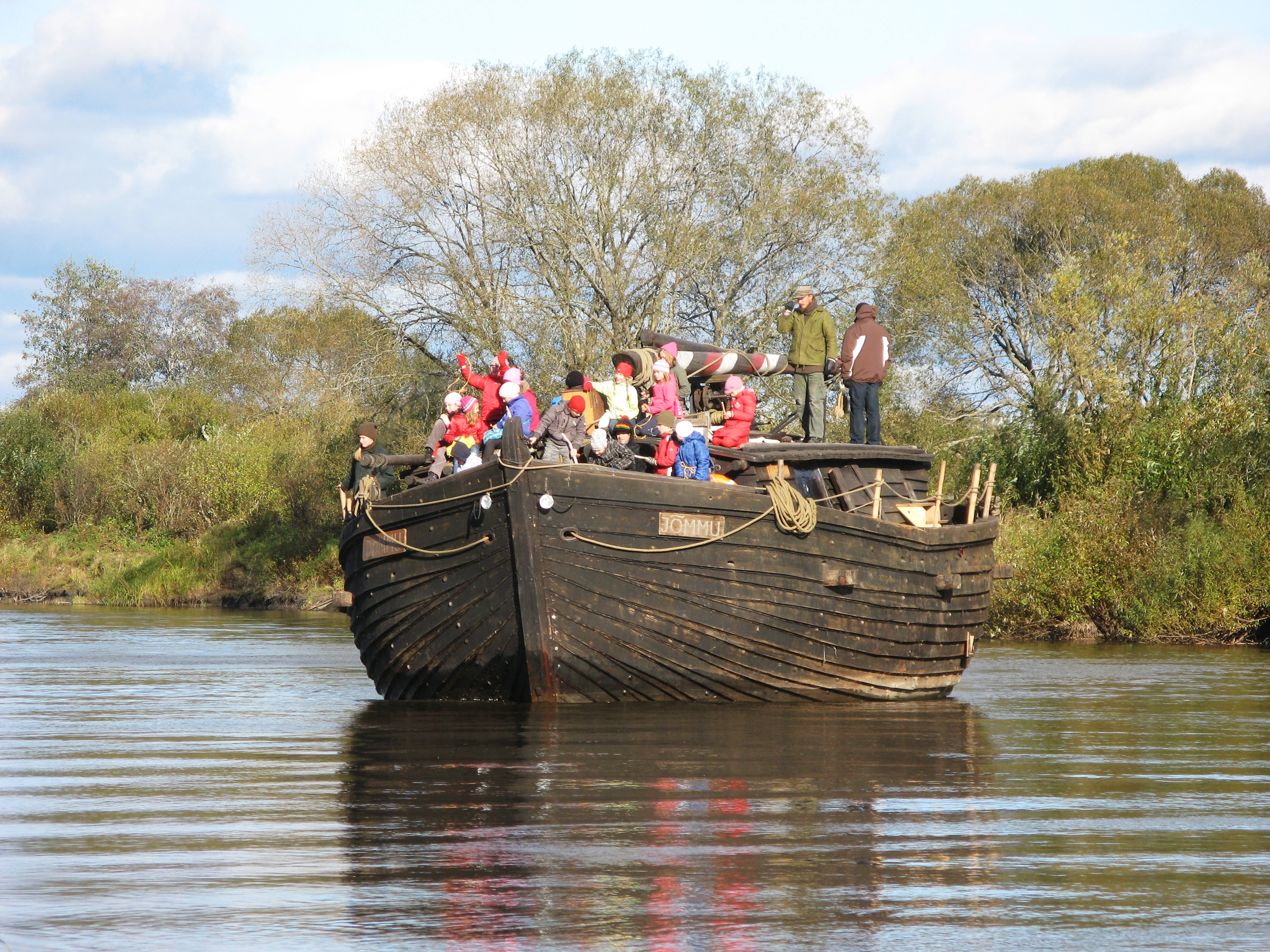 Lodi Jõmmu Emajõel